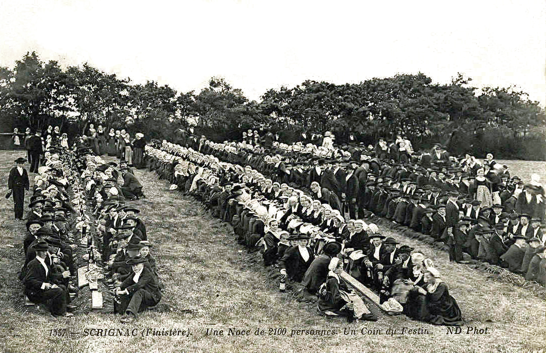 Un coin du festin d'une noce de 2100 personnes en 1912 à Scrignac. Il s'agit du mariage de Pierre Marie Auffret et Anne Marie Brousseau.